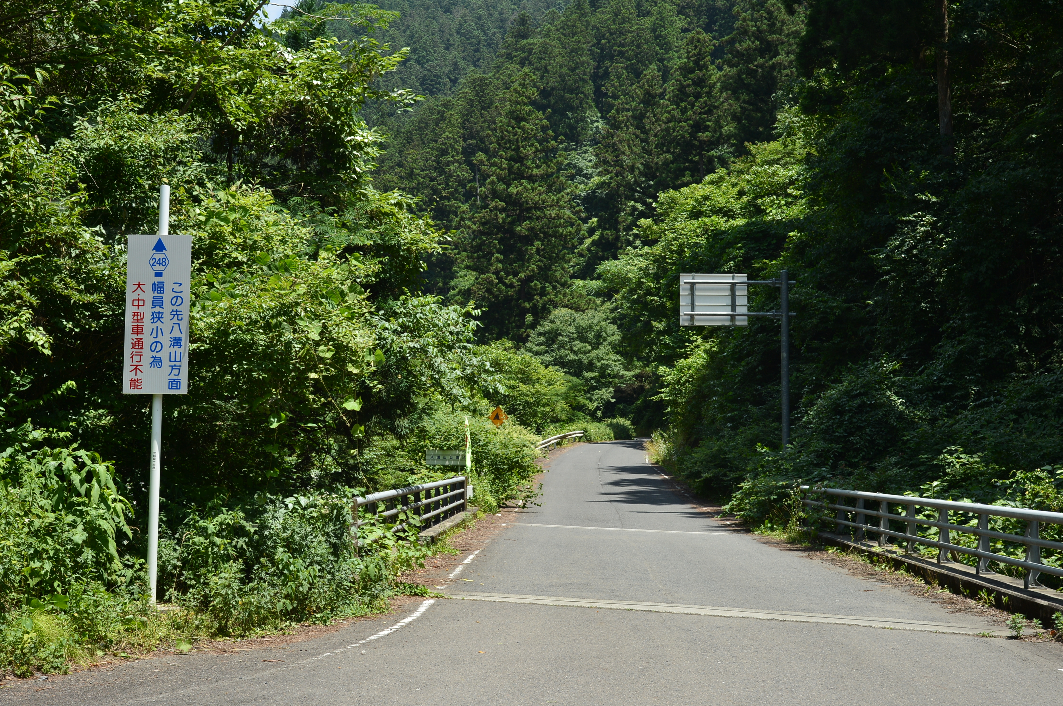 茨城県道248号八溝山公園線の起点付近（久慈郡大子町上野宮）